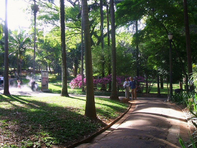 Parque (ou Praça) Buenos Aires, em Higienópolis, São Paulo, Brasil.